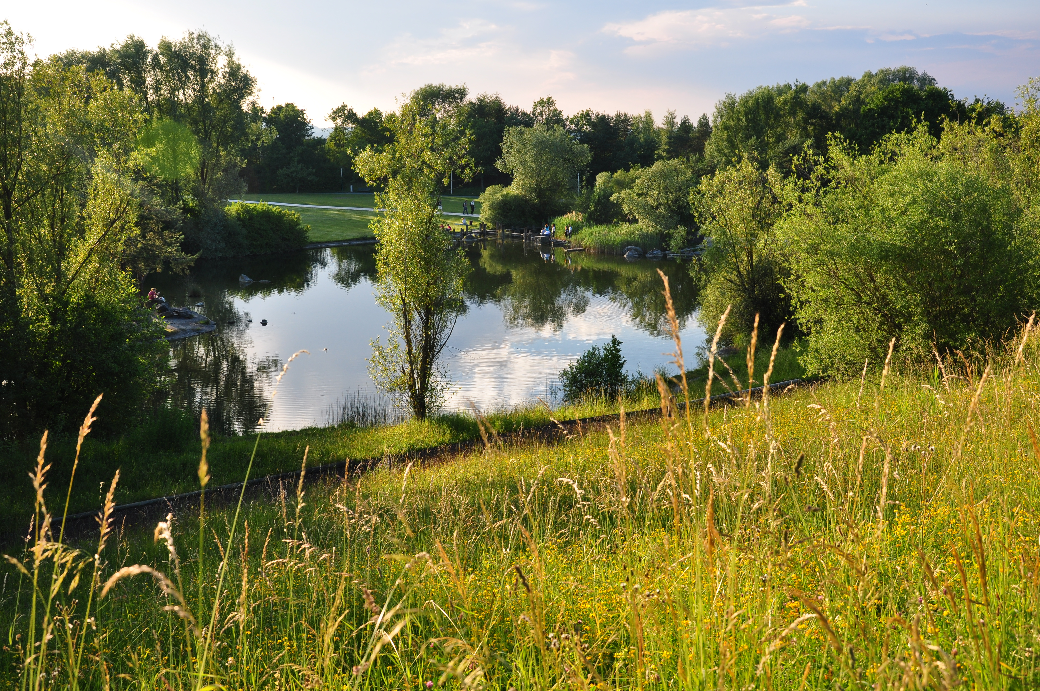 Irchelpark in Zürich (Switzerland)